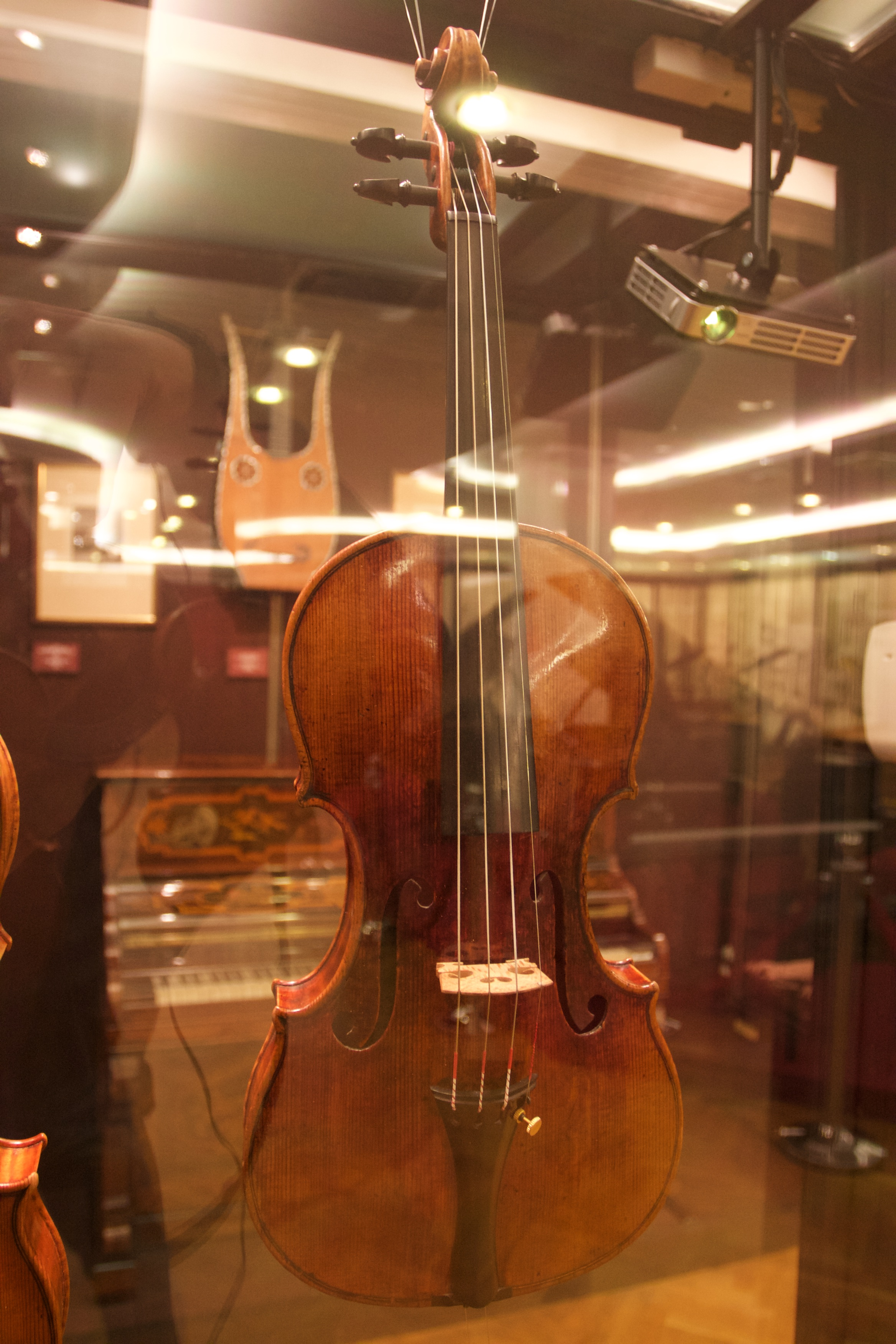 Violon datant de 1742 de Giuseppe Guarneri del Gesù, visible au musée national Glinka de Moscou